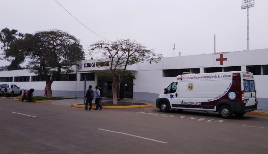 UNMSM Clínica Universitaria 2019 - Vista lateral